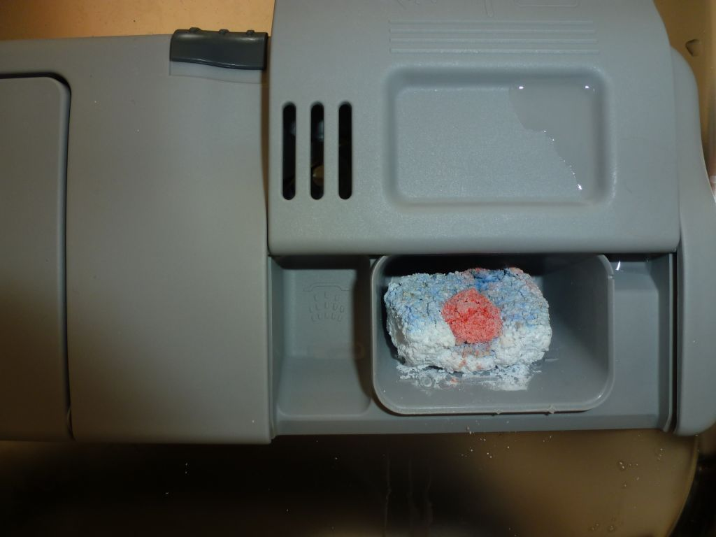 The Mysteryof the un(dis)solved Soap Tab